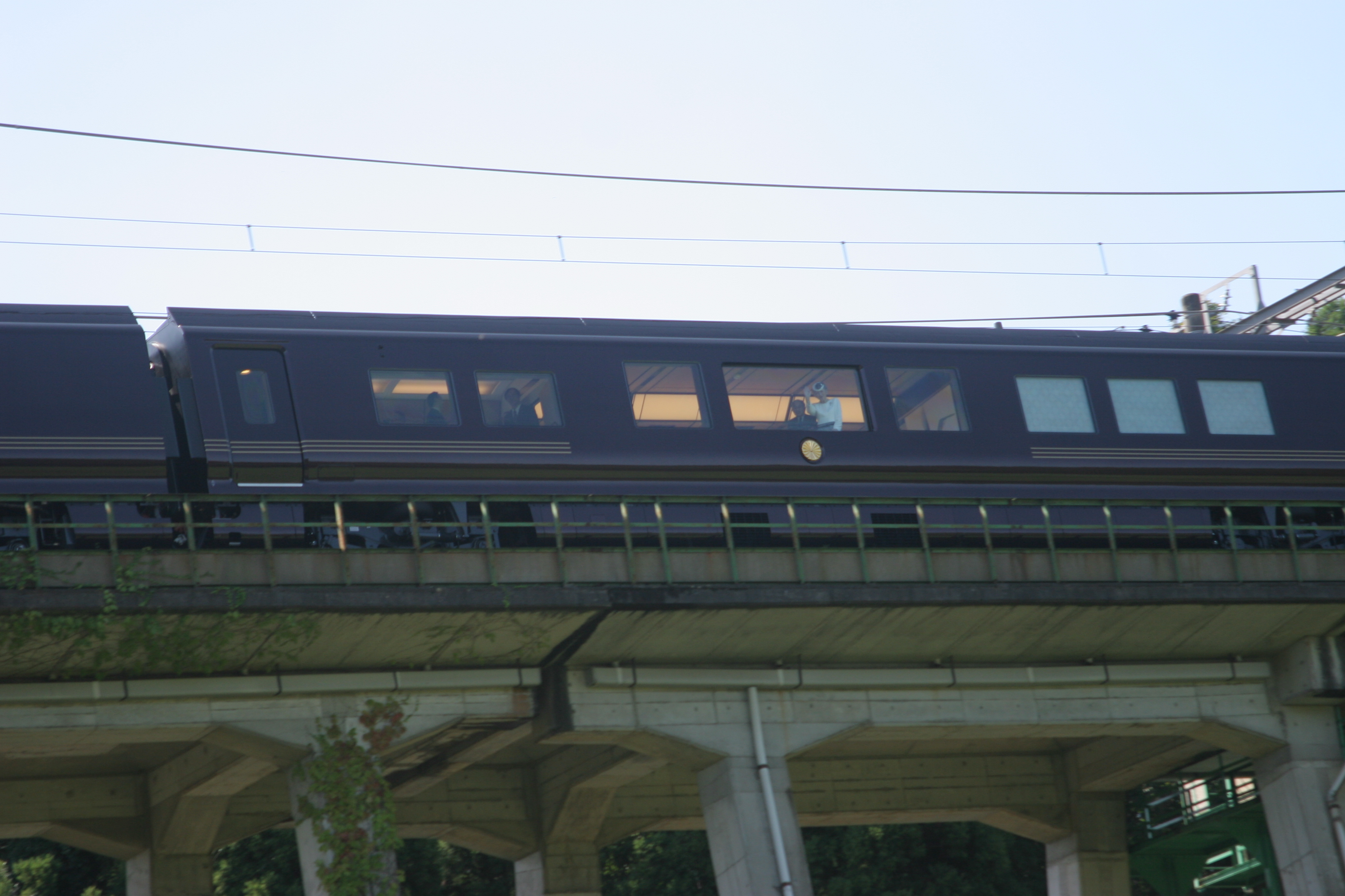 2010年9月26日に外房線で運転されたお召し列車で特別車両にお立ちにる天皇皇后両陛下